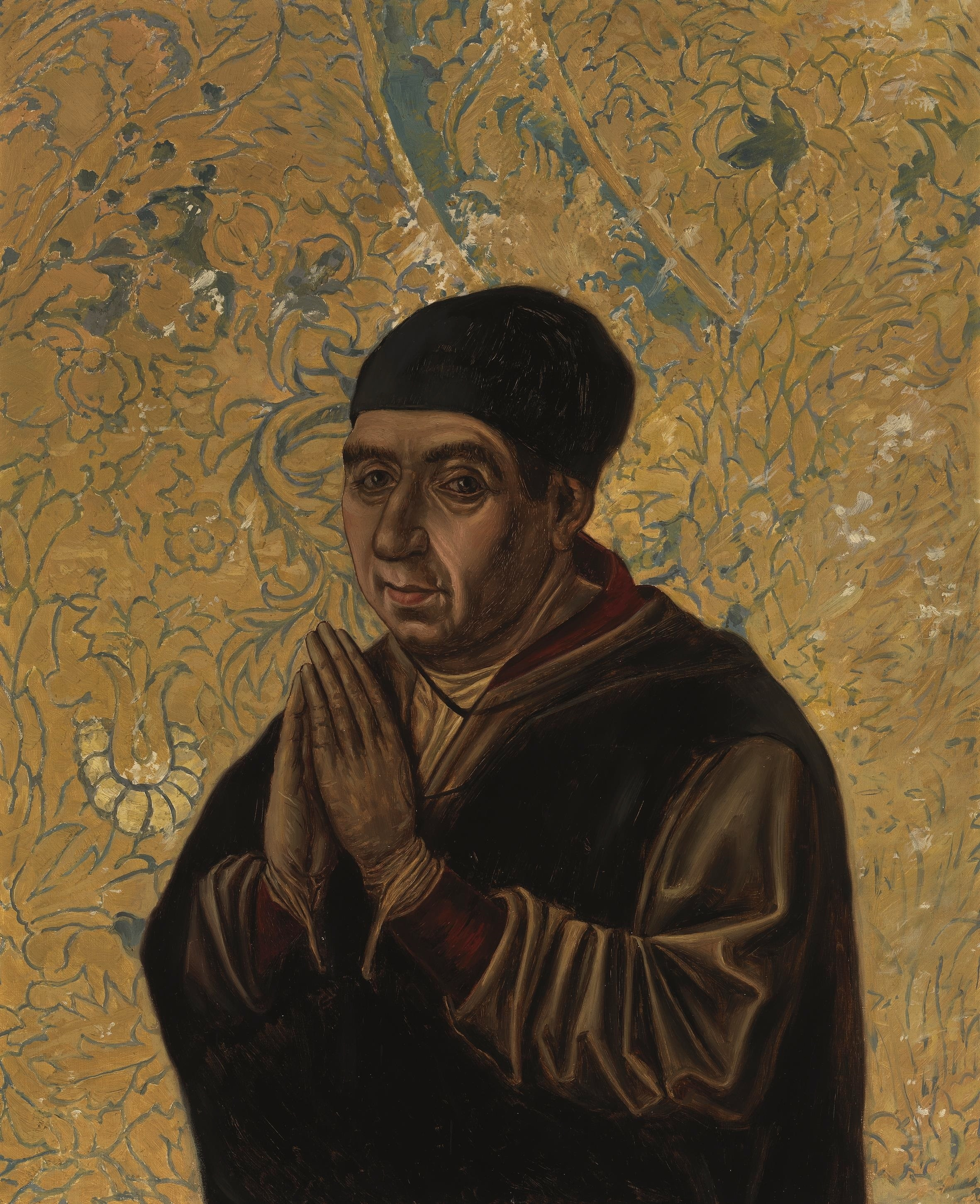 Retrato decimonónico del arquitecto español Juan Guas (1430-1496). Esta obra es una copia del retrato del arquitecto que se conserva en la capilla donde está sepultado, ubicada en la iglesia de los Santos Justo y Pastor de Toledo, (España).